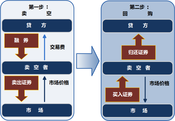 中文（中国大陆）: 证券空头图解，翻译自英文版